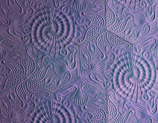 Paviment hidràulic dissenyat pel col·laborador de Gaudí, Joan Beltran, per a la casa Batlló, tot i que es va acabar instal·lant a la casa Milà